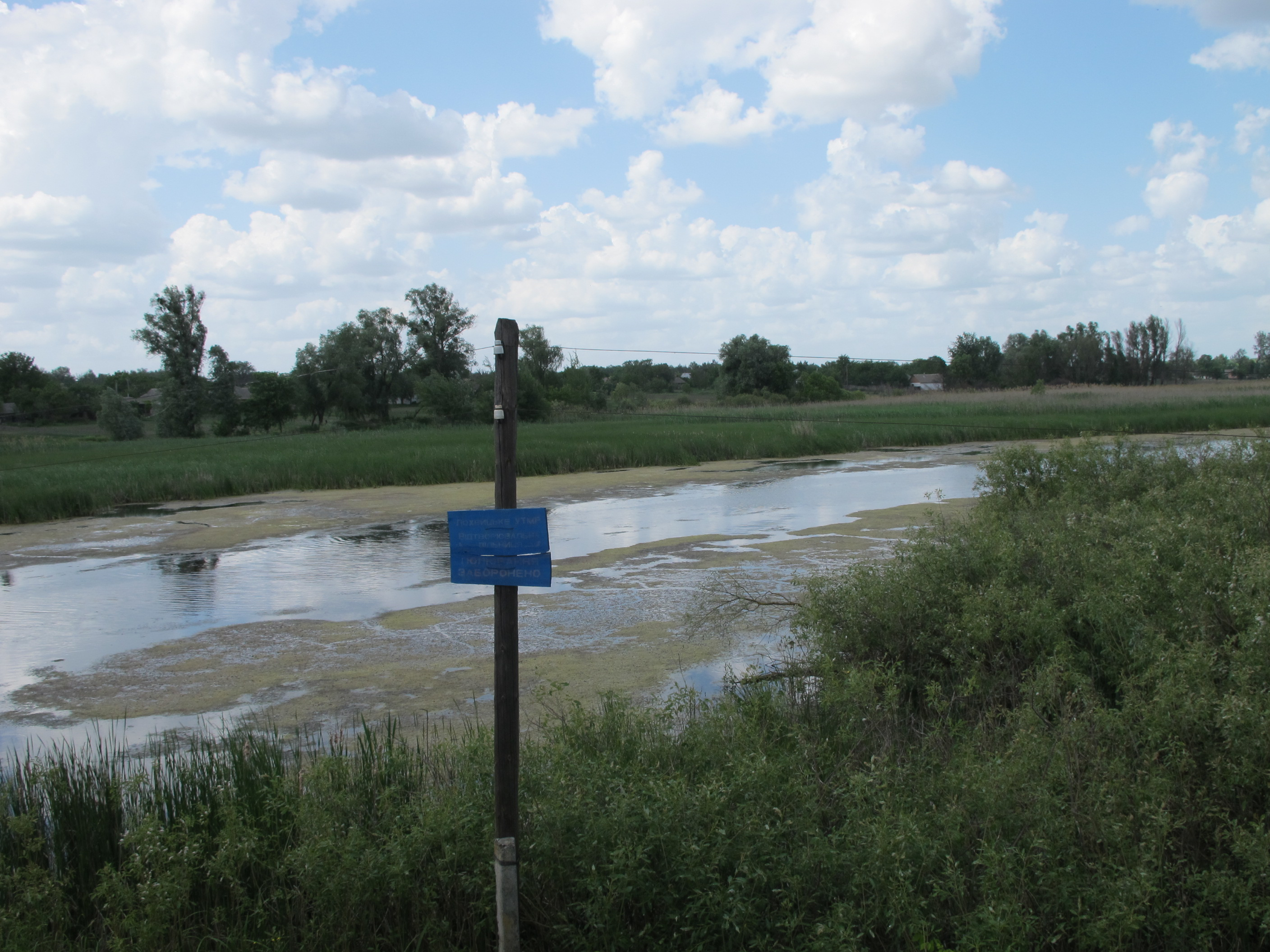 Река Сула в селе Пески Лохвицкого района